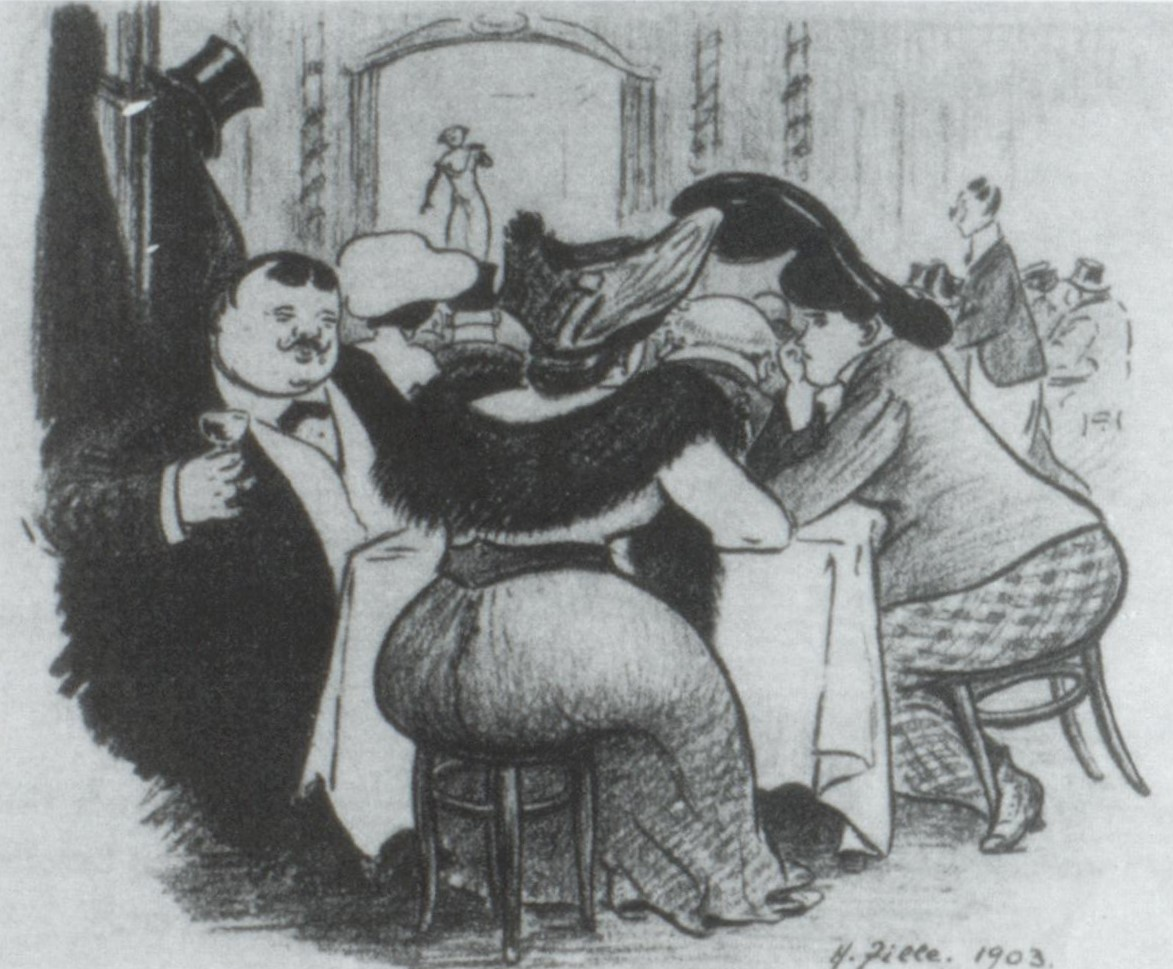 Heinrich Zille Cabaret Silberne Punschterrine 1903